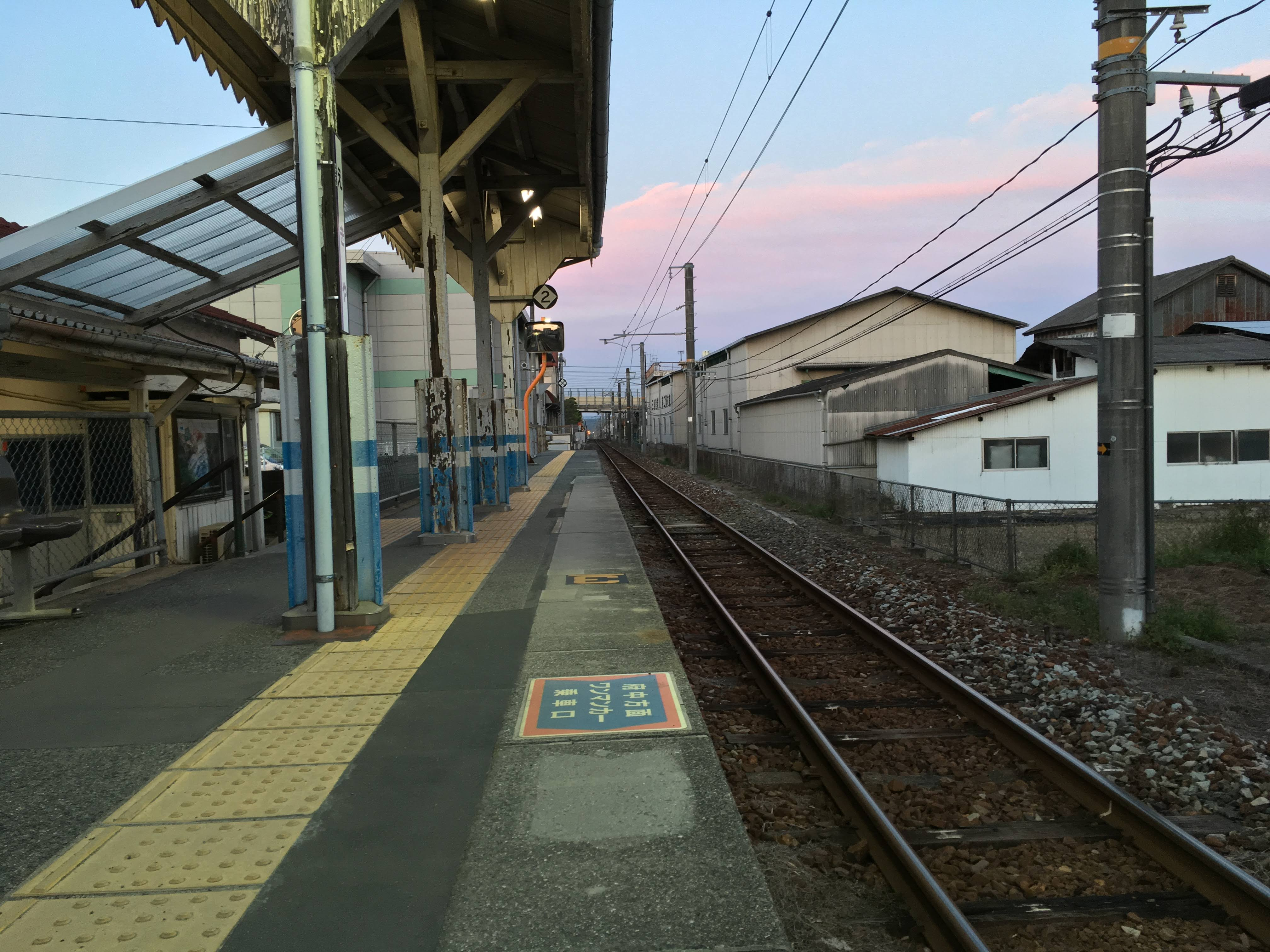 駅 Home 線路 Line 撮影日 Date 17April2019 2019年4月17日